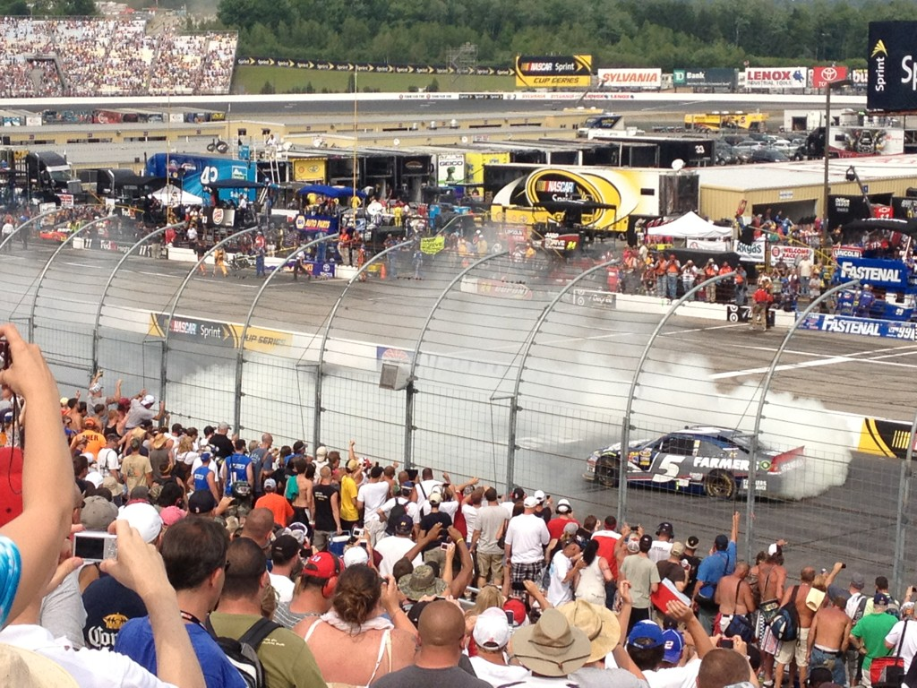 Kasey Kahne beraksi usai menang di New Hampshire Motor Speedway